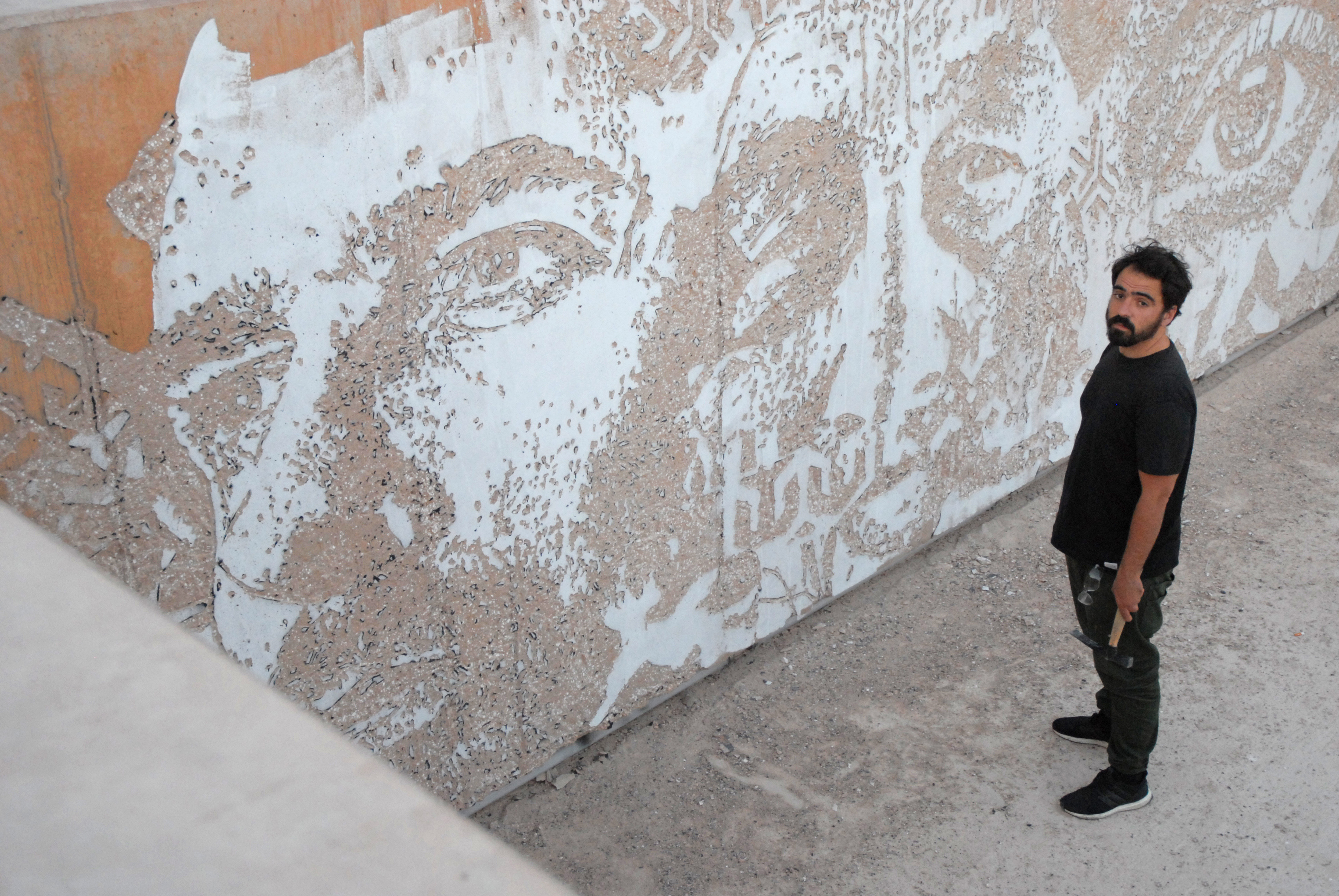 Vhils, 2017, Beja / Portugal